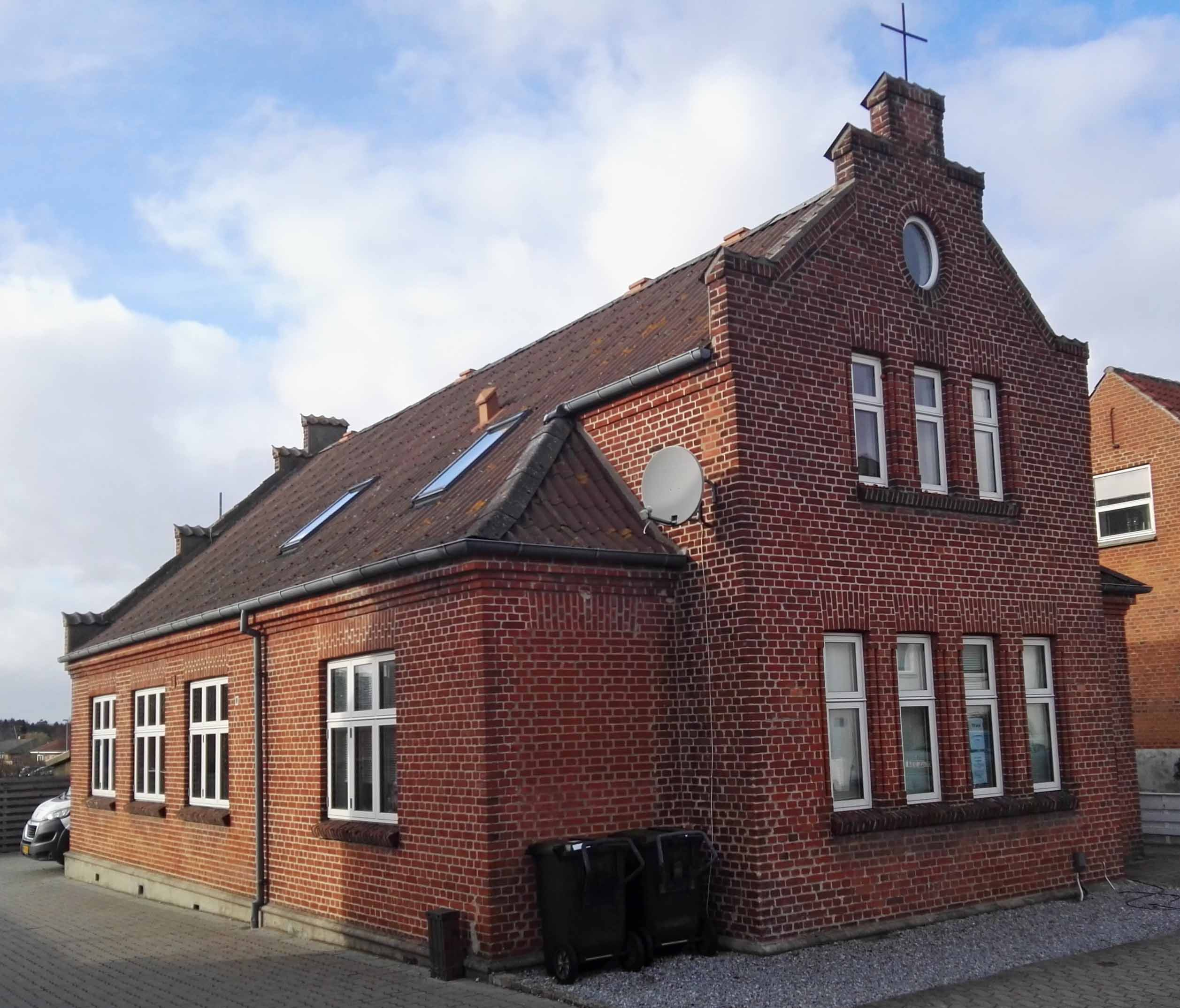 Det tidligere missionshus i Auning